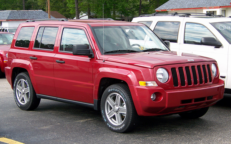 2007 Jeep Patriot, Front quarter